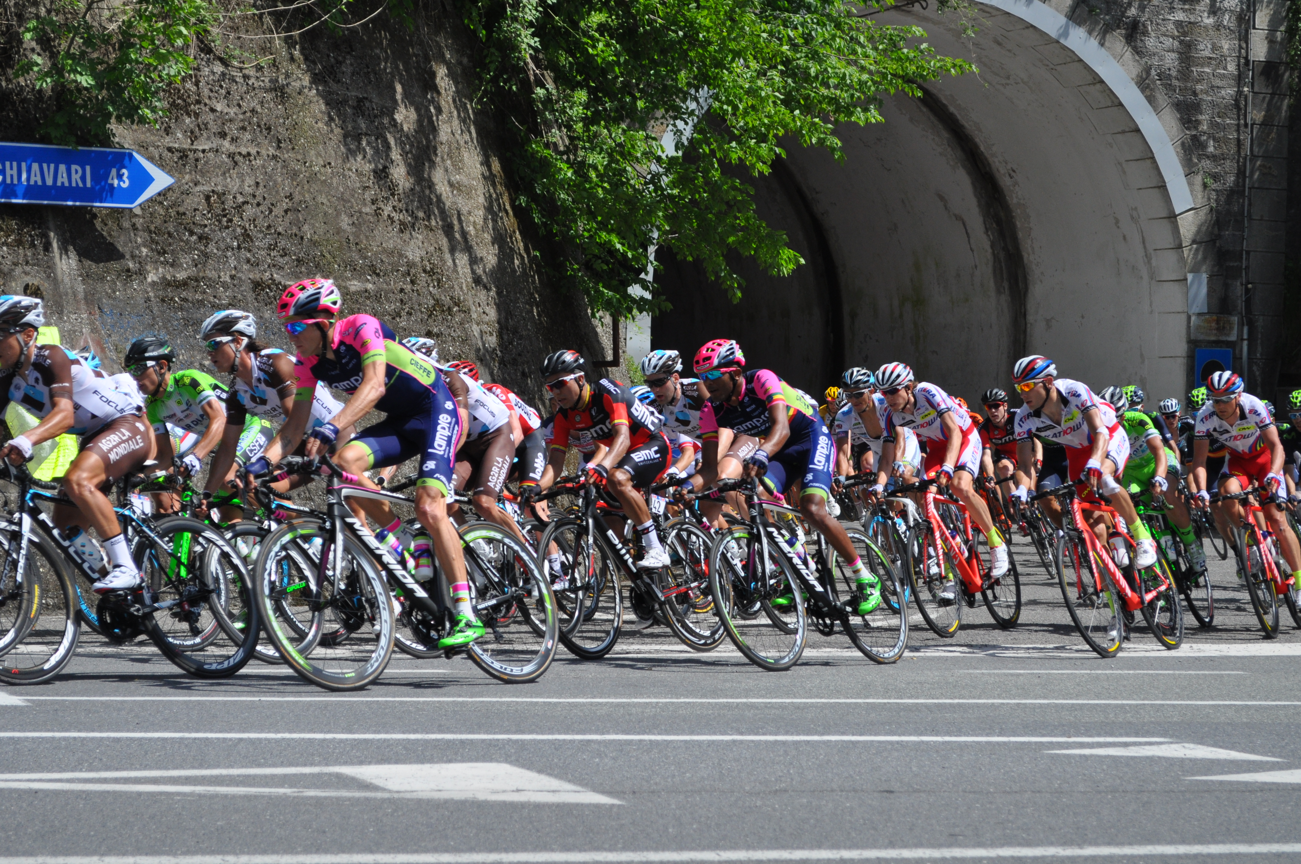 Il gruppo al passaggio nella frazione di Sottocolle durante la 3a tappa del giro 2015